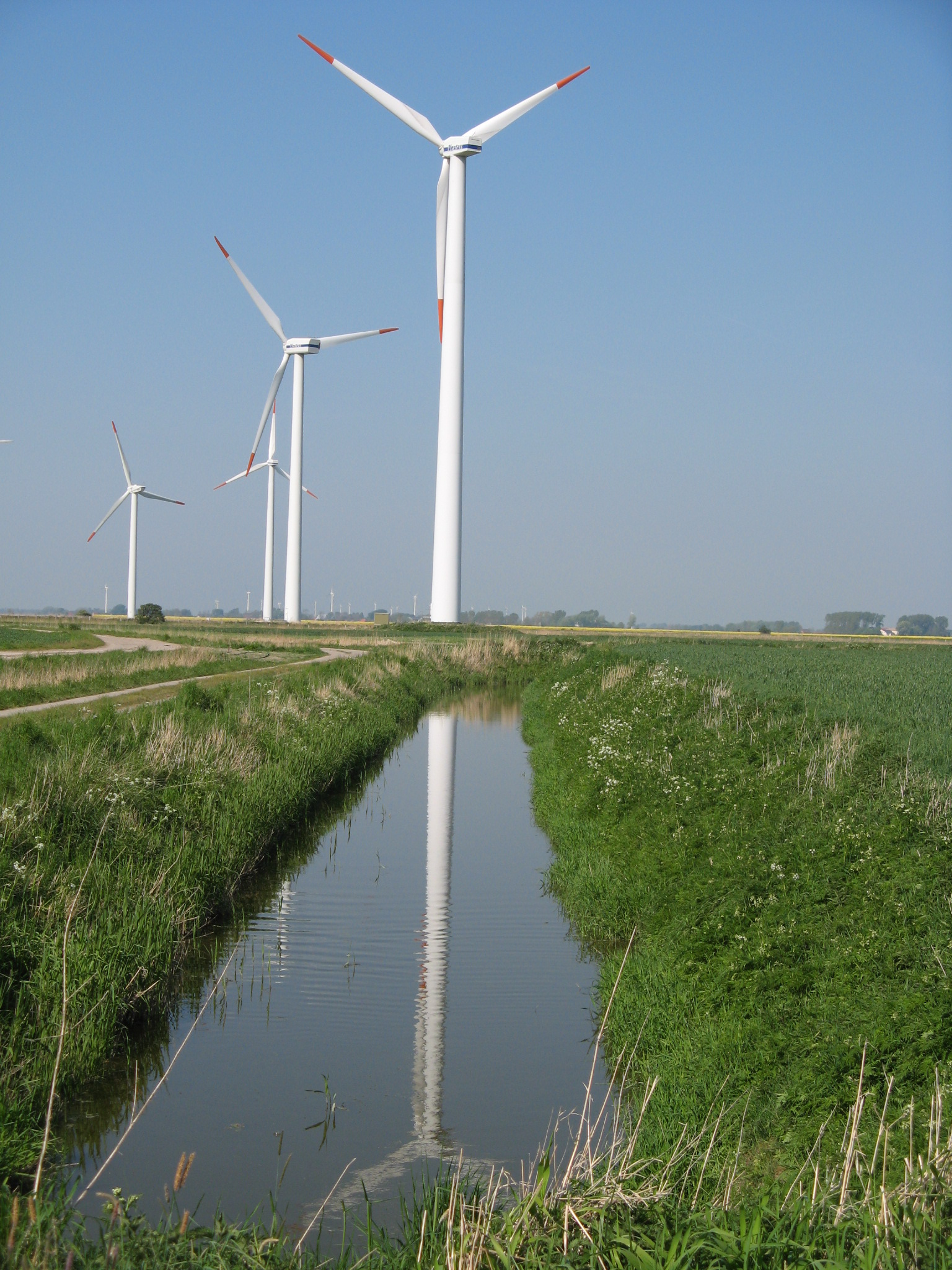 wind energy turbine in Oesterwurth, Schleswig-Holstein, Germany